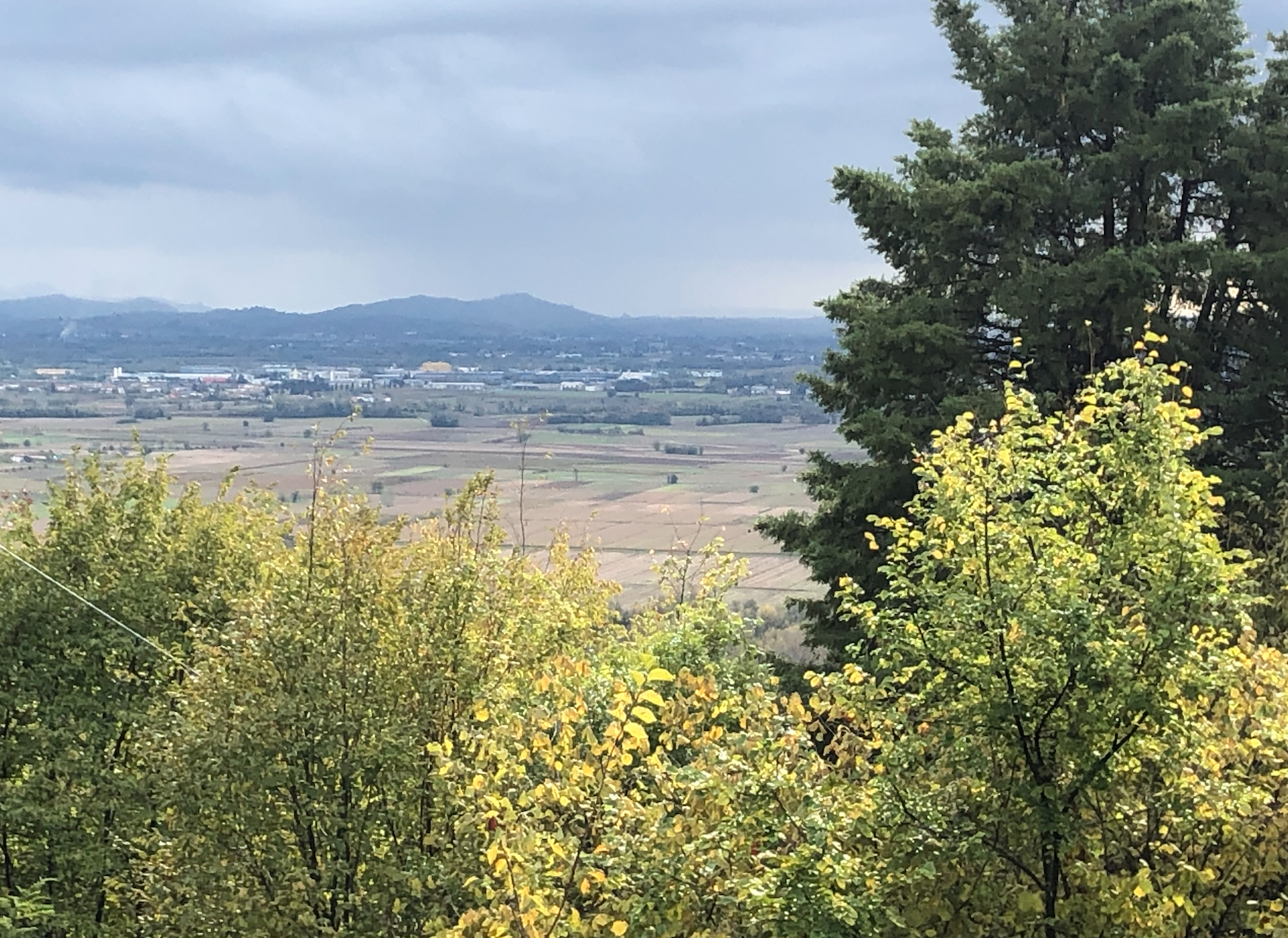 Castello di Soffumbergo - Veduta